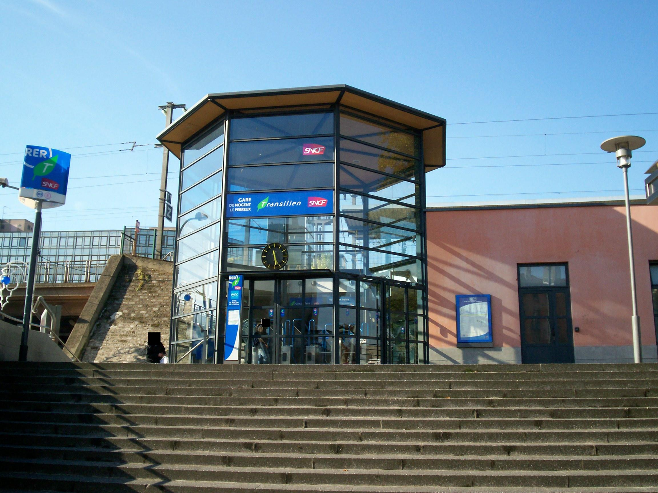 Gare de Nogent - Le Perreux